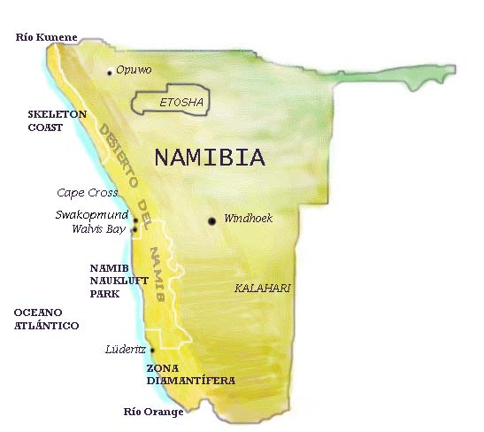 Mapa de Namibia resaltando Etosha